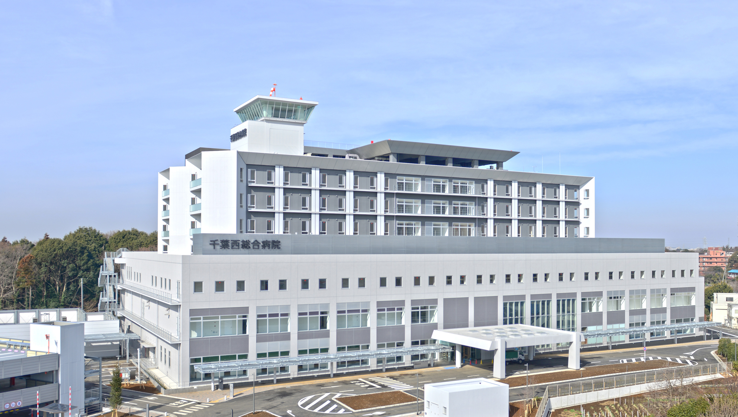 千葉西総合病院の新本館